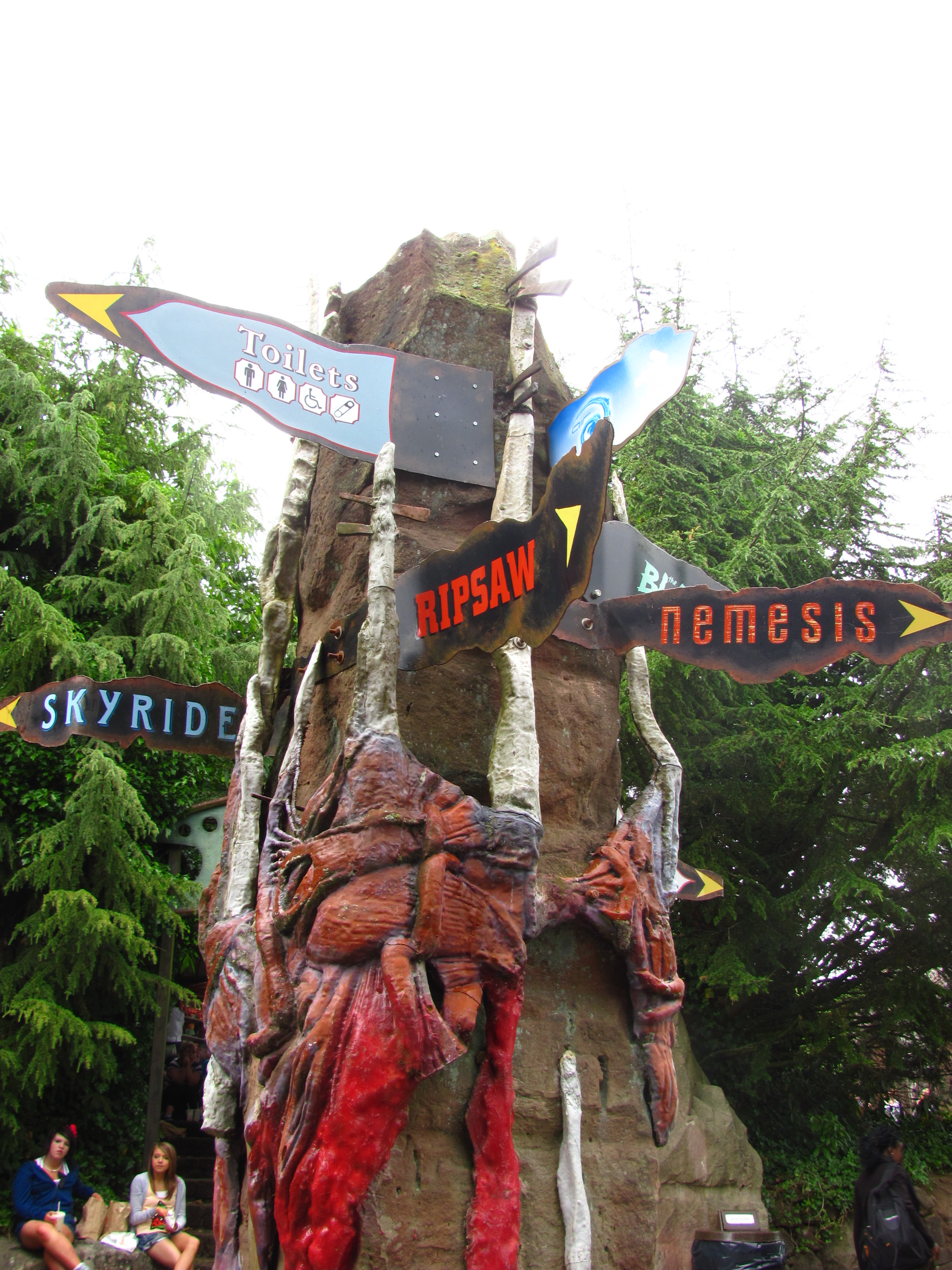 Alton Towers Forbidden Valley ride signs